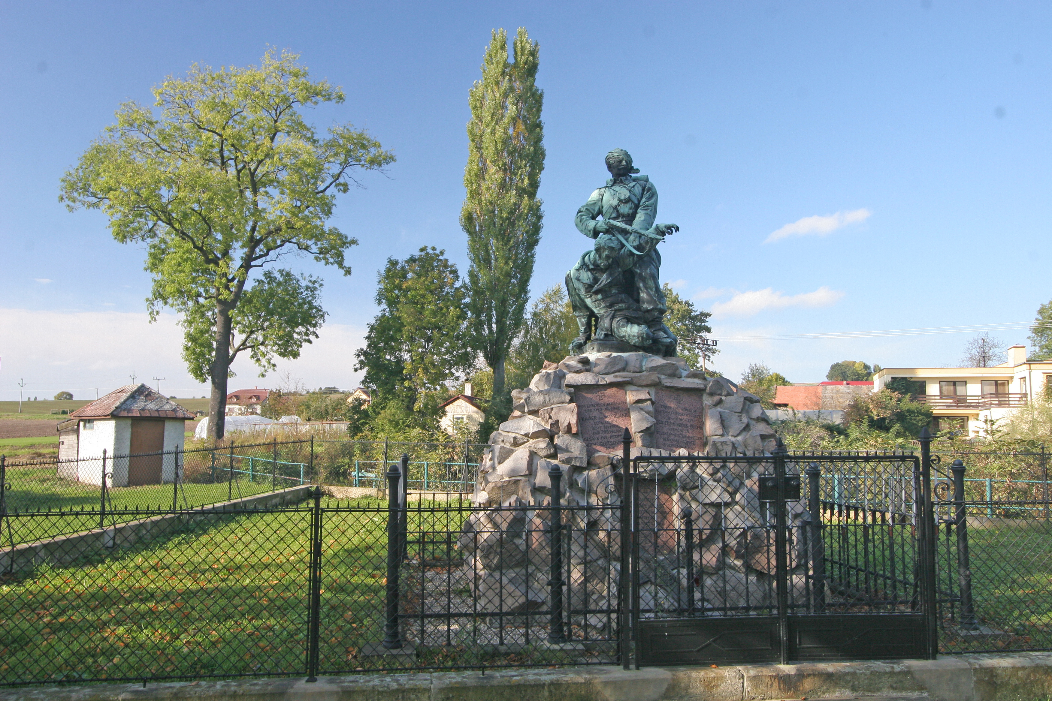 Pomník z války 1866 (Rozběřice), u rybníka, Rozběřice